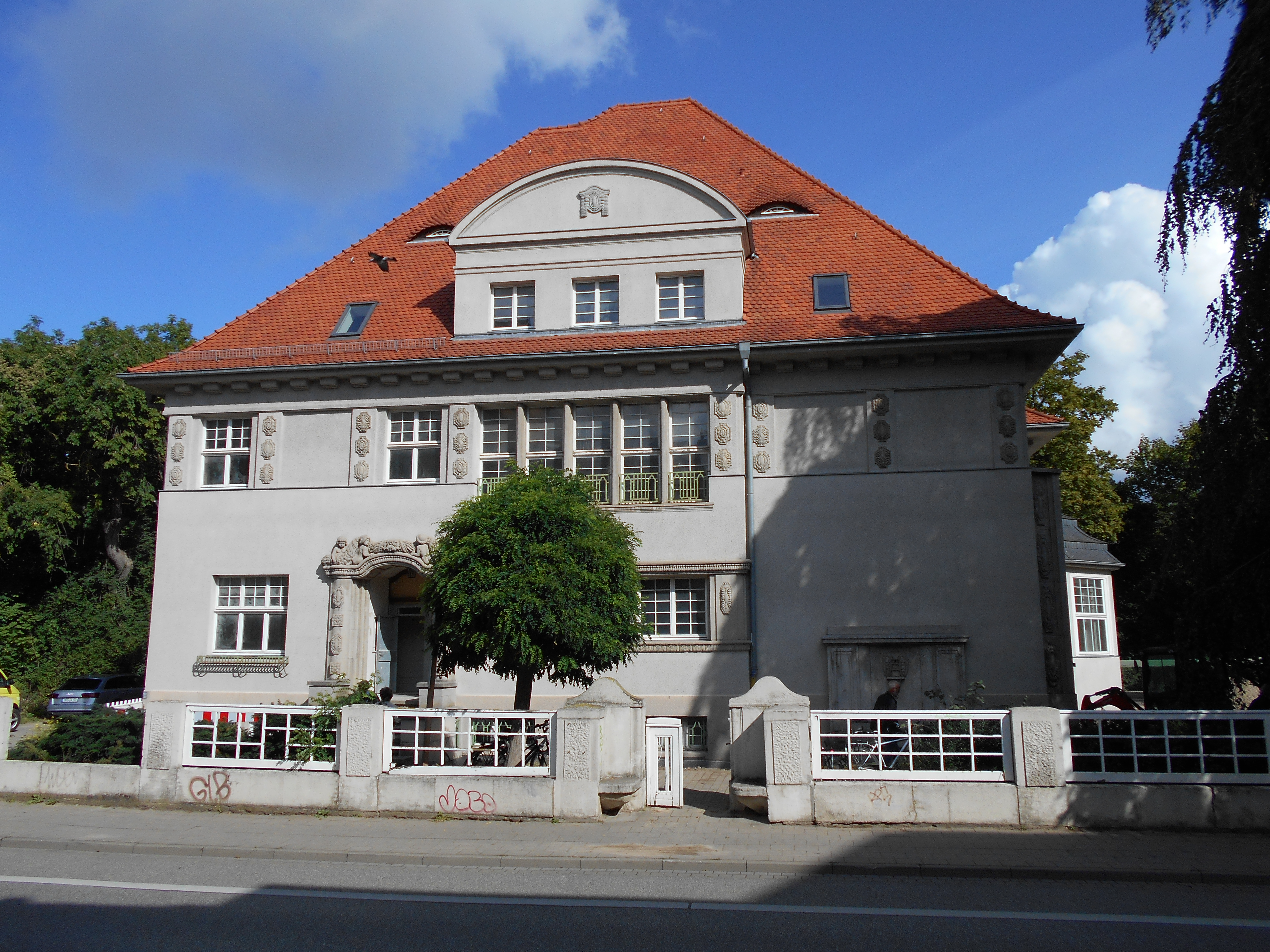 August Bebel Str 55 Rostock Straßenseite